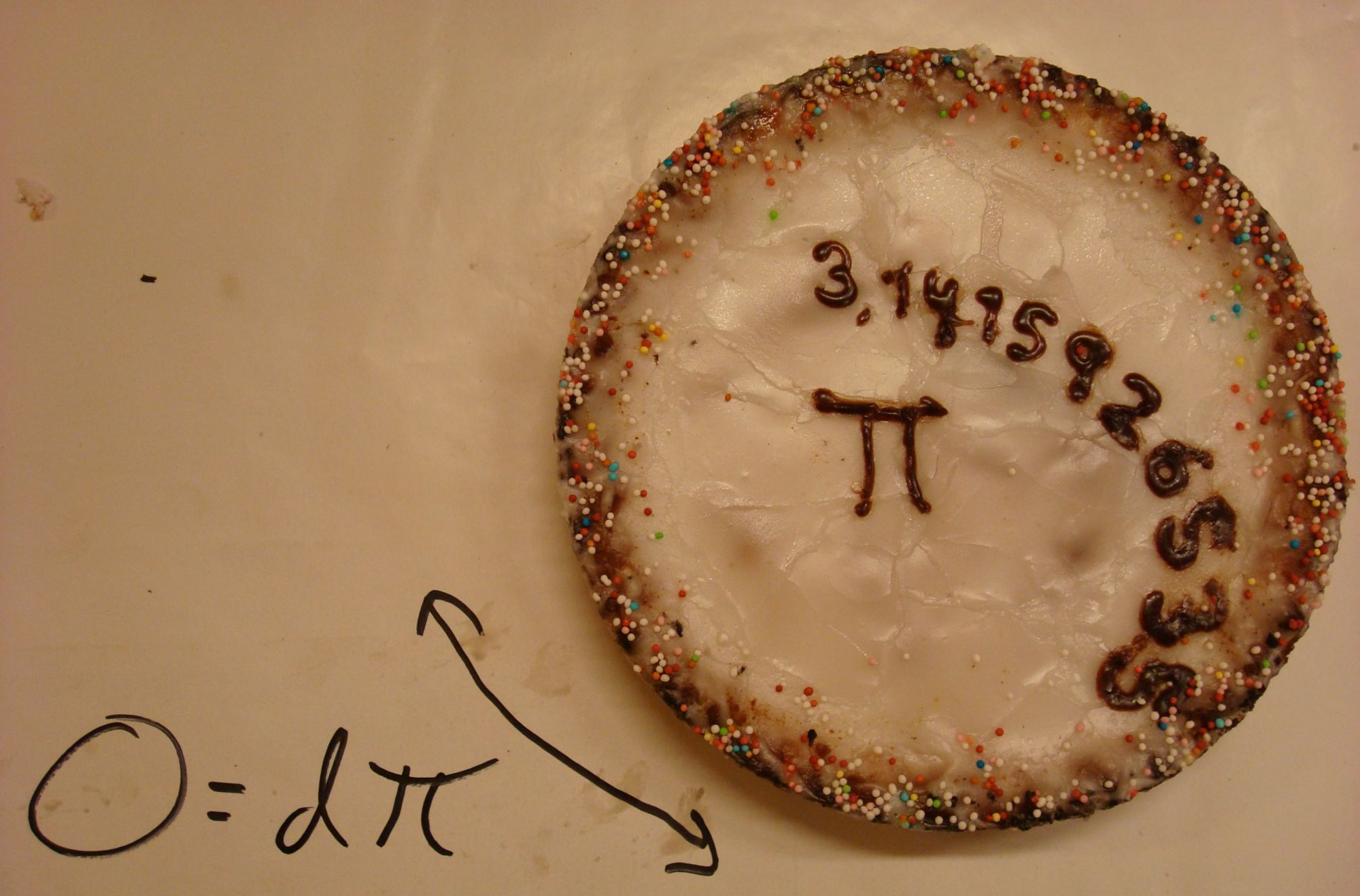 En tærte lavet i anledning af pi-dagen.